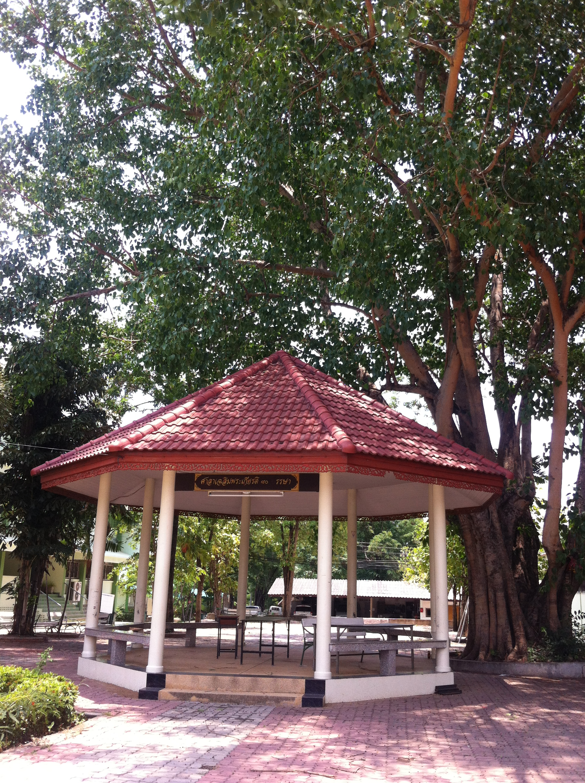 ลานโพธิ์ สถานที่นัดหมายและ